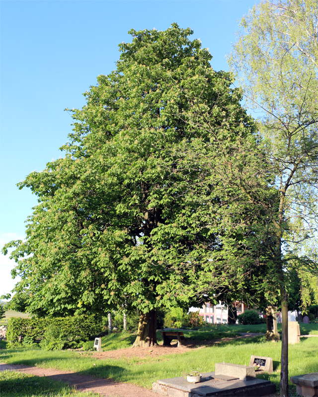 ND-7331-392: Kastanie auf dem Friedhof in Bornheim. Siehe auch Liste der Naturdenkmale in Bornheim (Rheinhessen)